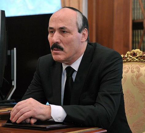 Рамазан Гаджимурадович Абдулатипов, Москва 01.02.2013 г.